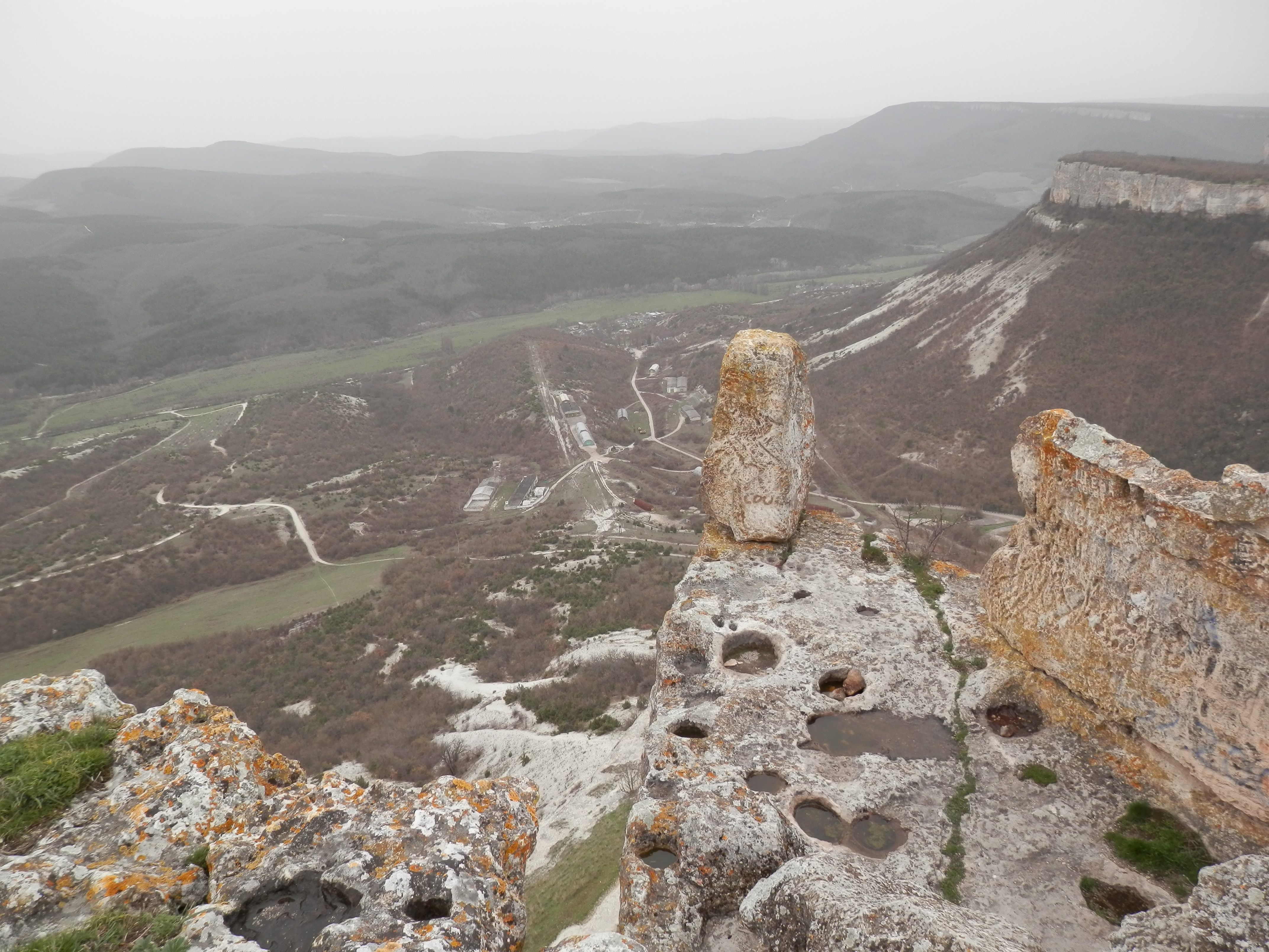 вид з гори